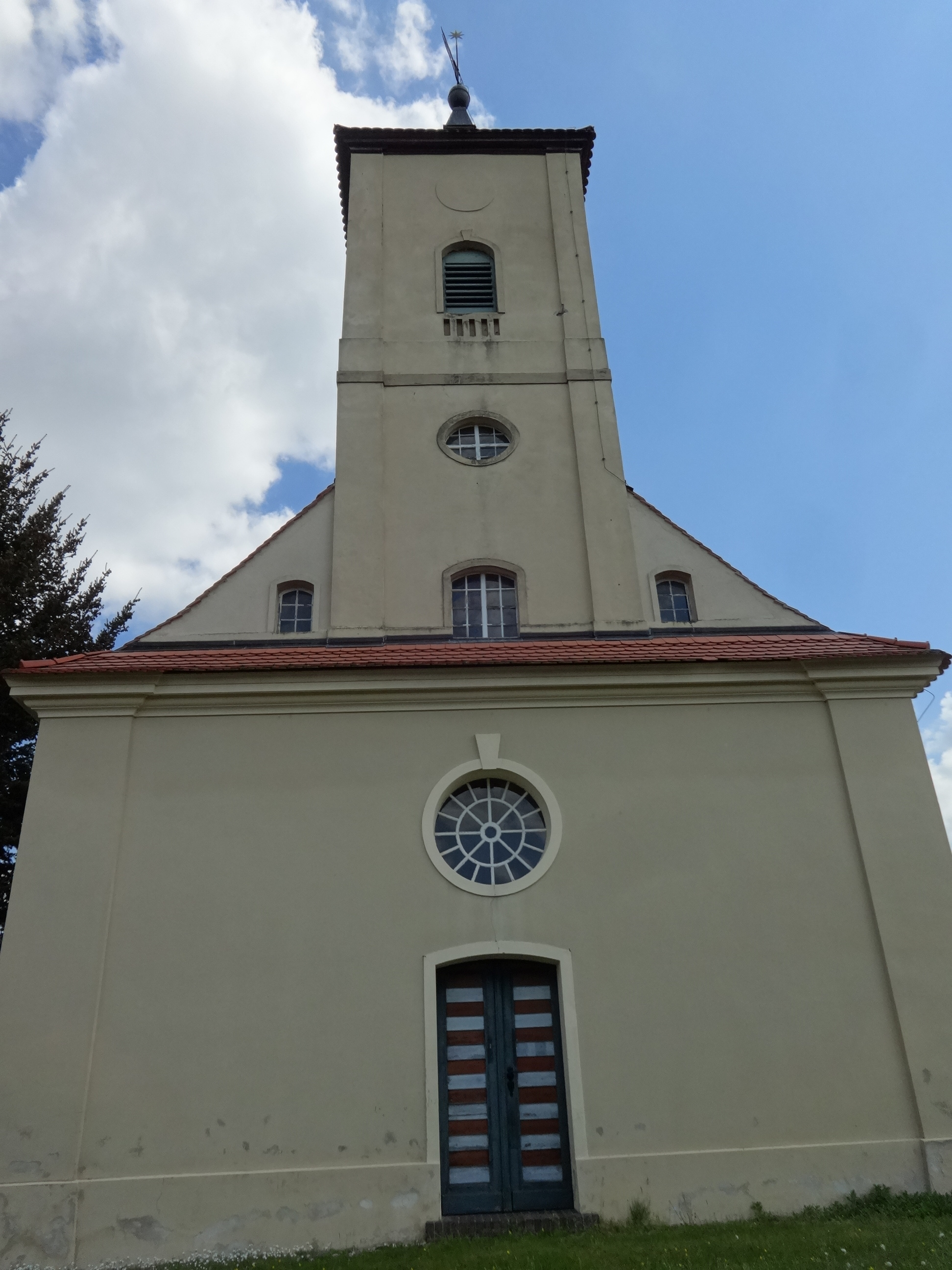 Die evangelische Dorfkirche entstand 1765 als Saalkirche. Der barocke Bau ist mit einem schlichten Putz und hohen Stichbogenfenstern versehen. Im Innern befinden sich ein Kanzelaltar aus dem 17. Jahrhundert sowie eine Schuke-Orgel aus dem Jahr 1929.